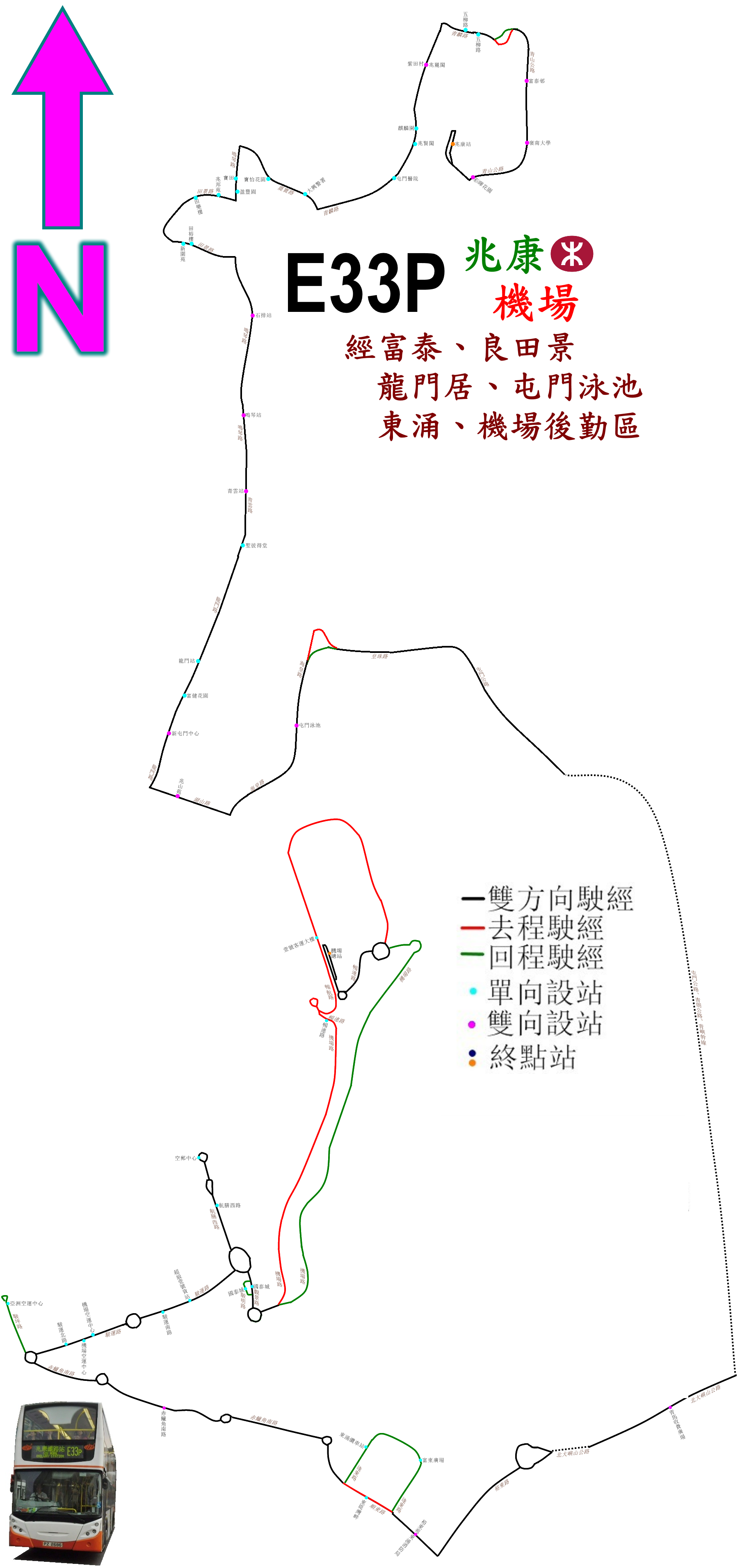 中文（香港）: 龍運巴士E33P線的走線圖